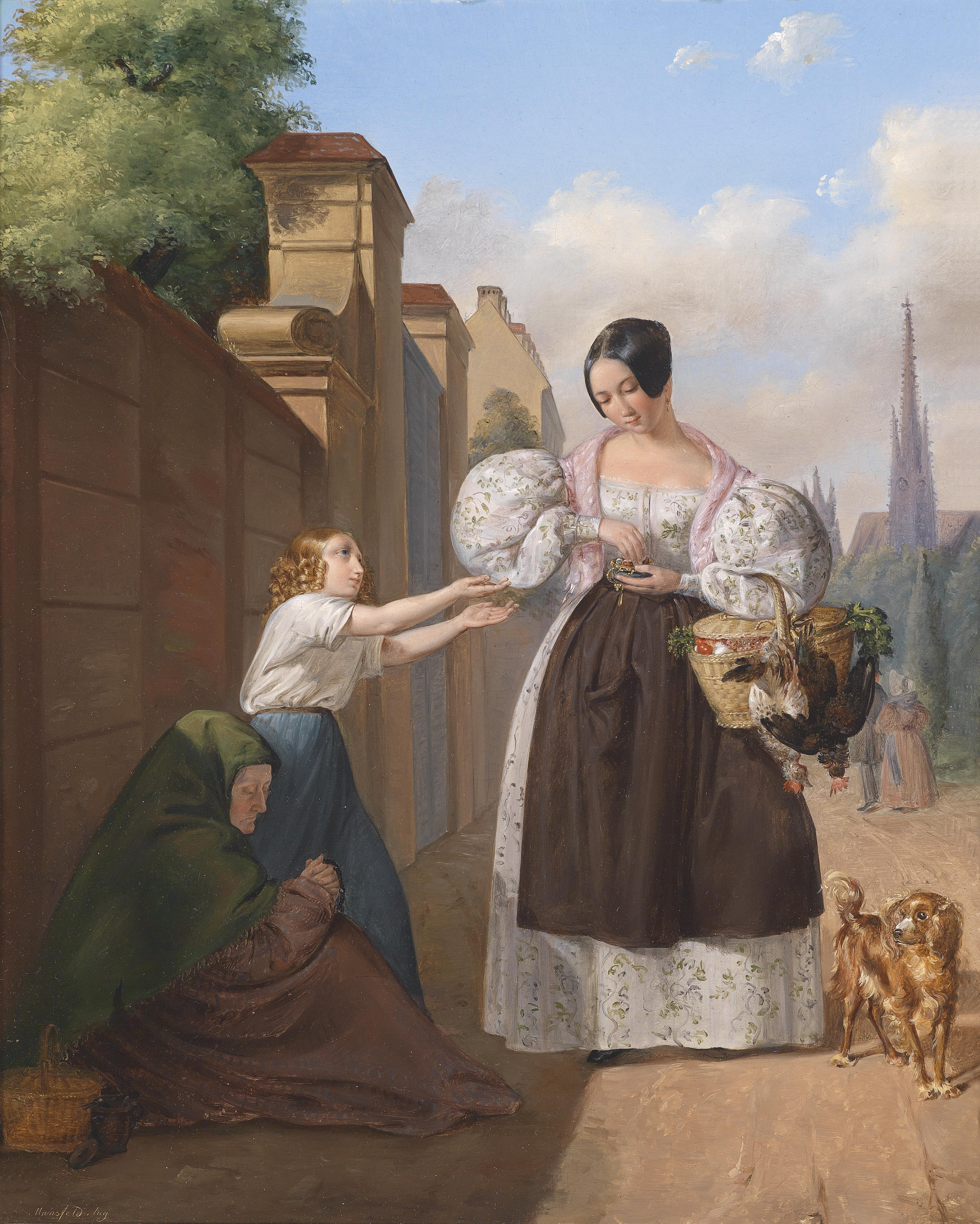 im Hintergrund der Stephansdom